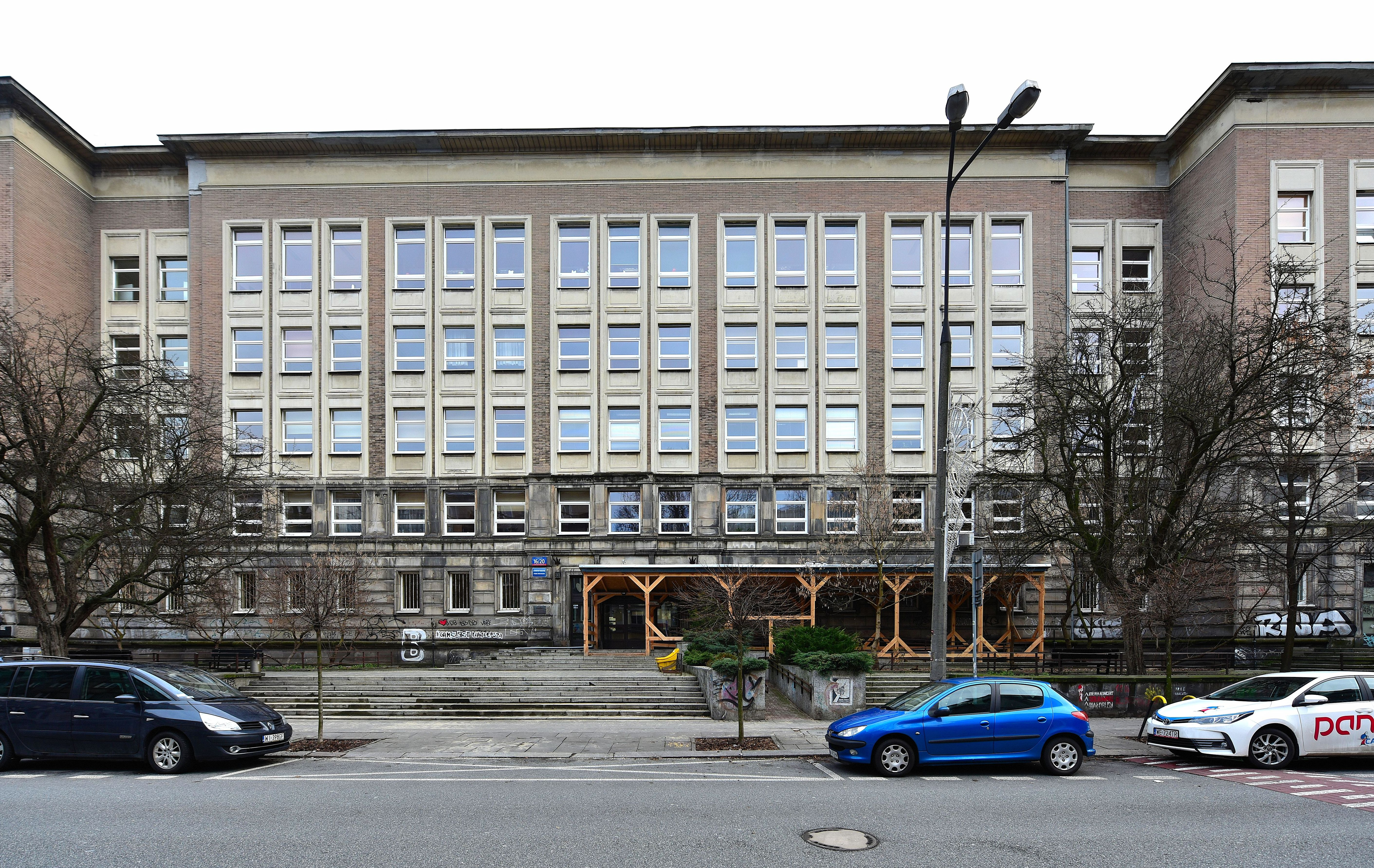 Siedziba Wydziału Pedagogicznego Uniwersytetu Warszawskiego przy ul. Mokotowskiej 16/20 w Warszawie